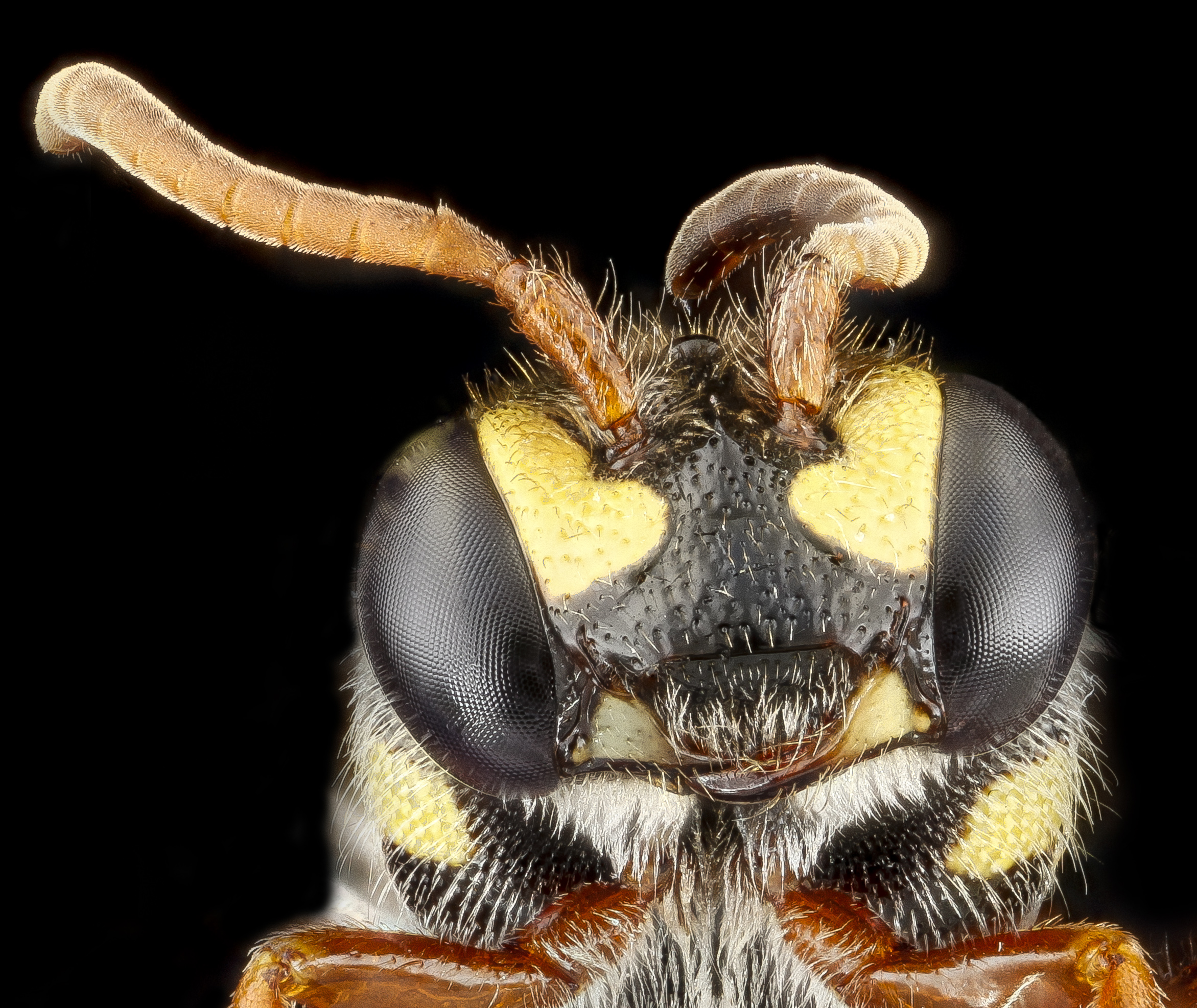 Dominican Republic